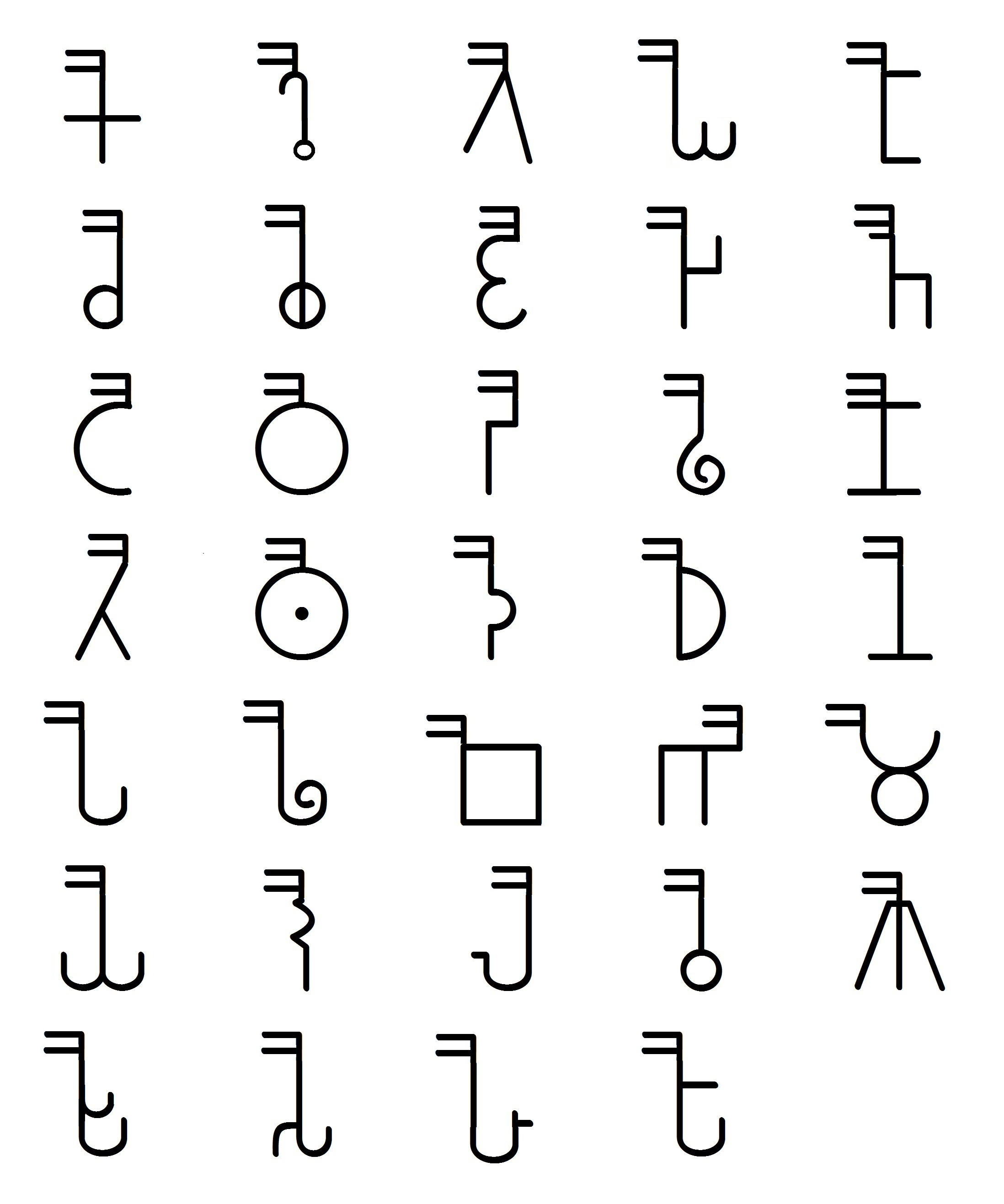 ब्राम्हि व्यंजनांचे ऐ-कार